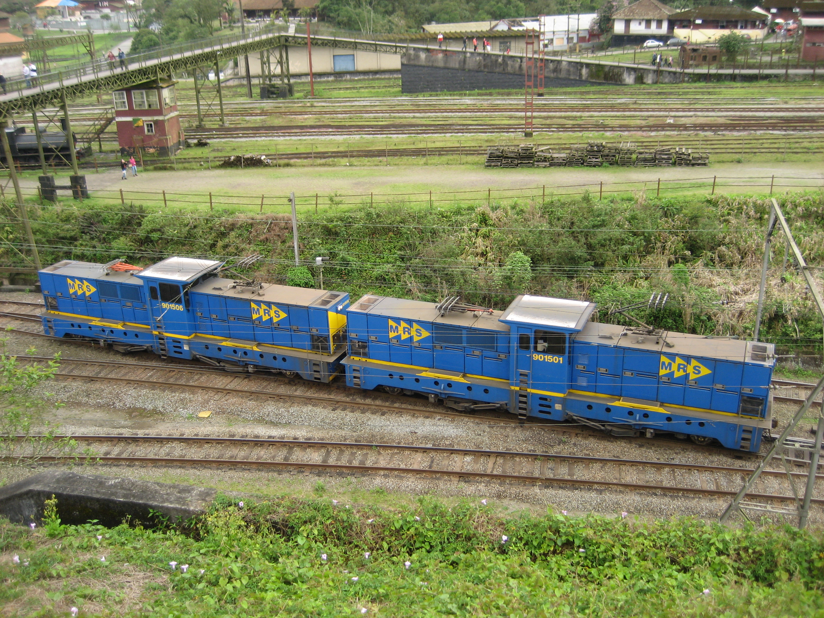 2 Exemplare (Doppeltraktion von 901501 und 901506) der Stadler He 4/4, der stärksten Zahnradlokomotive der Welt, in Paranapiacaba, der Bergstation des Zahnradabschnitts zwischen Santos und São Paulo